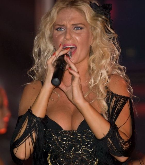 La cantante rumana Andreea Banica en un concierto en Cluj, 2008.